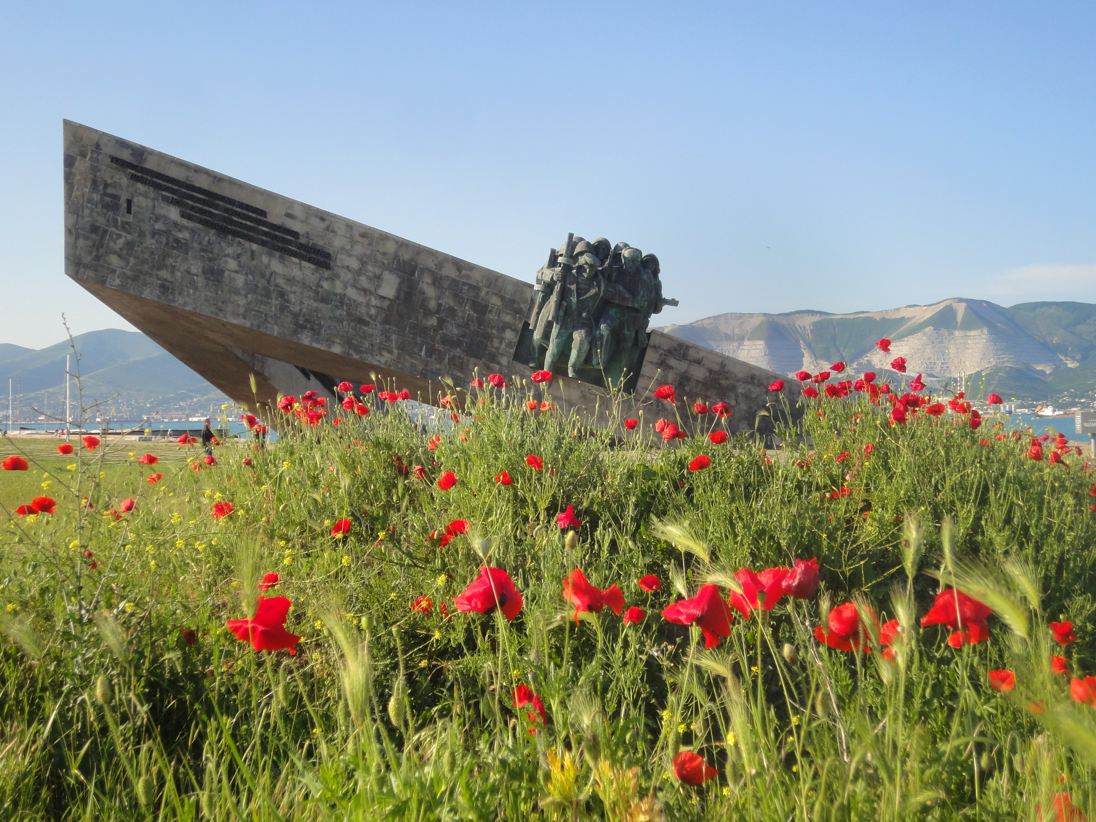 Мемориал «Малая земля» с галереей боевой славы: проспект Ленина, Новороссийск, Краснодарский край